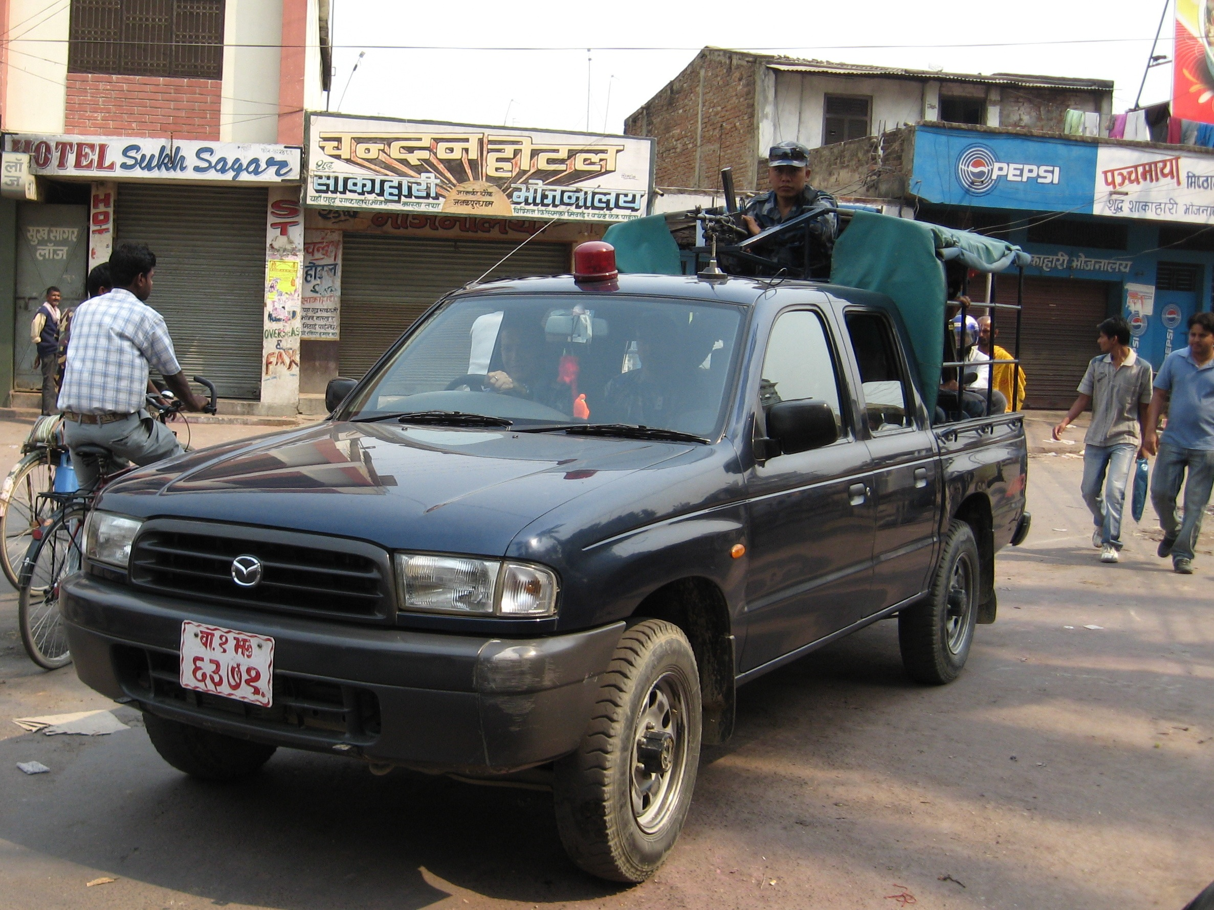 Polizei in Janakpur (Nepal).